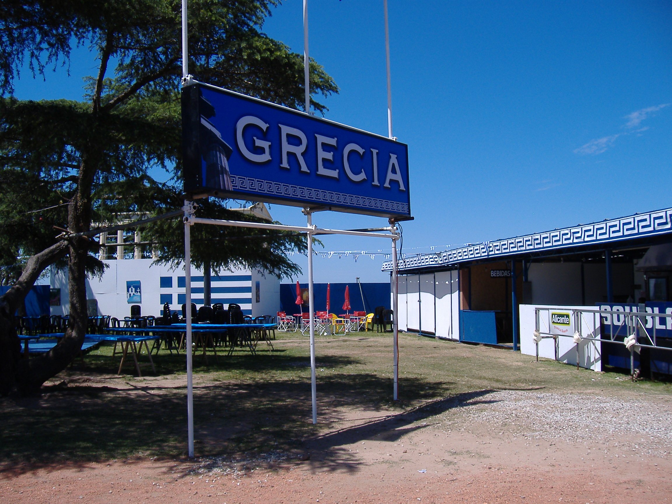 Greece's place at the Encuentro y Fiesta Nacional de Colectividades, Rosario, Argentina.